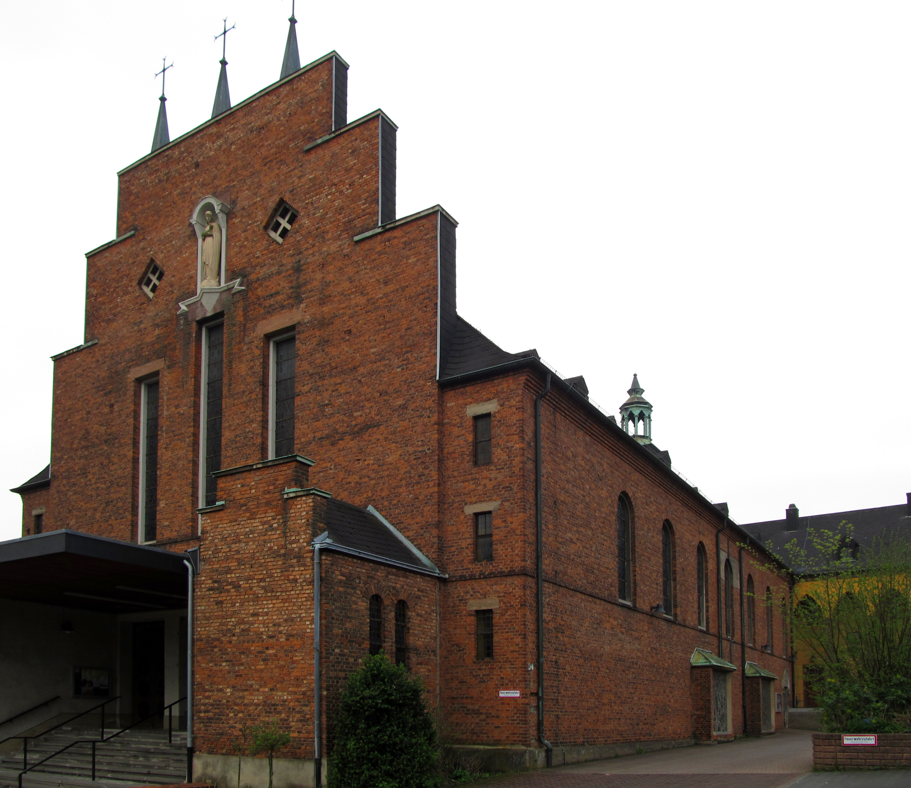 Die katholische Pfarrkirche St. Marien bzw. Sieben Schmerzen Mariä in Friedrichsthal (Saar), Regionalverband Saarbrücken, Saarland